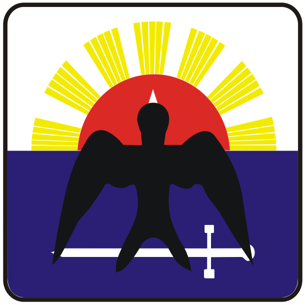 Escudo del Municipio de Cozumel